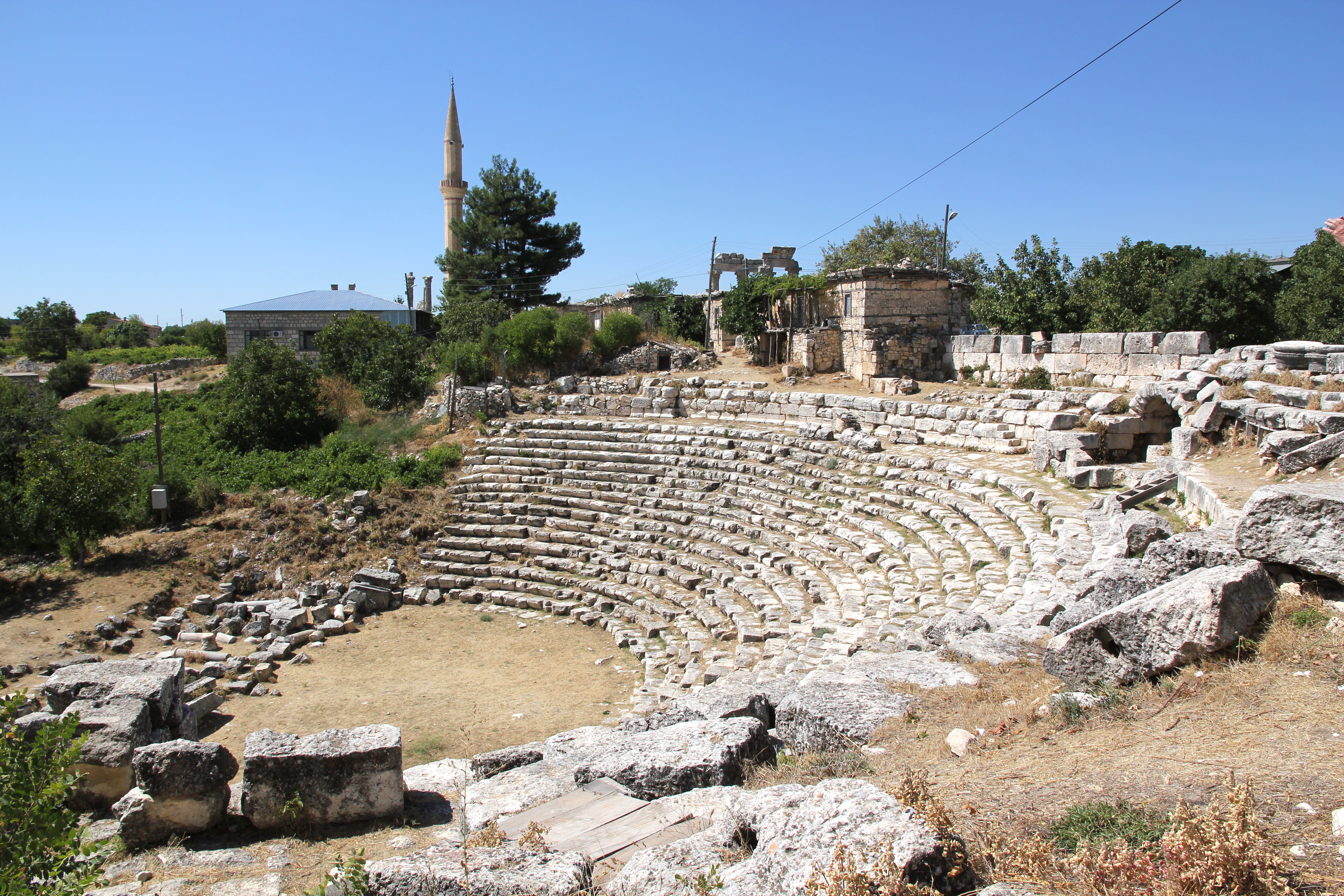 Theater von Diokaisareia bei Uzuncaburç, Südtürkei